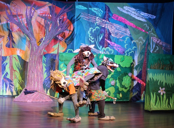 Спектакль "Жил-был у бабушки серенький козлик". 2016 год, Тувинский государственный театр кукол